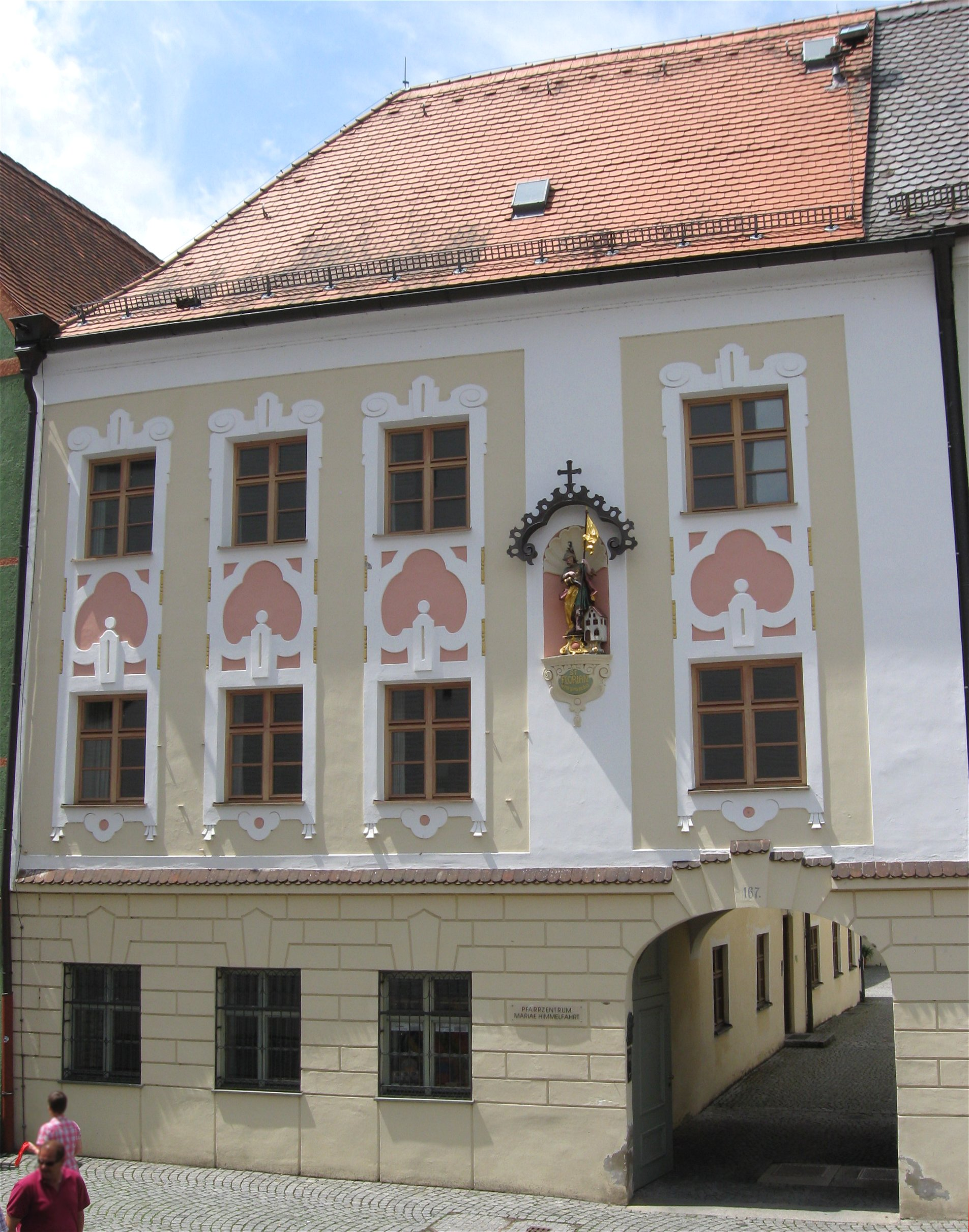 Ludwigstraße 167; Pfarrhaus, dreigeschossiger, einseitig abgewalmter Traufseitbau mit neubarocker Fassadengestaltung und dreigeschossiger Abseite mit Arkaden, im Kern um 1380, über zwei mittelalterlichen Anwesen mit Abseite neu errichtet 1694/95, Fassadengestaltung Anfang 20. Jahrhundert, Umbau 1986/87; mit Ausstattung; Hausfigur, Holzfigur des Hl. Florian, um 1750, Farbfassung 1986. D-1-81-130-264